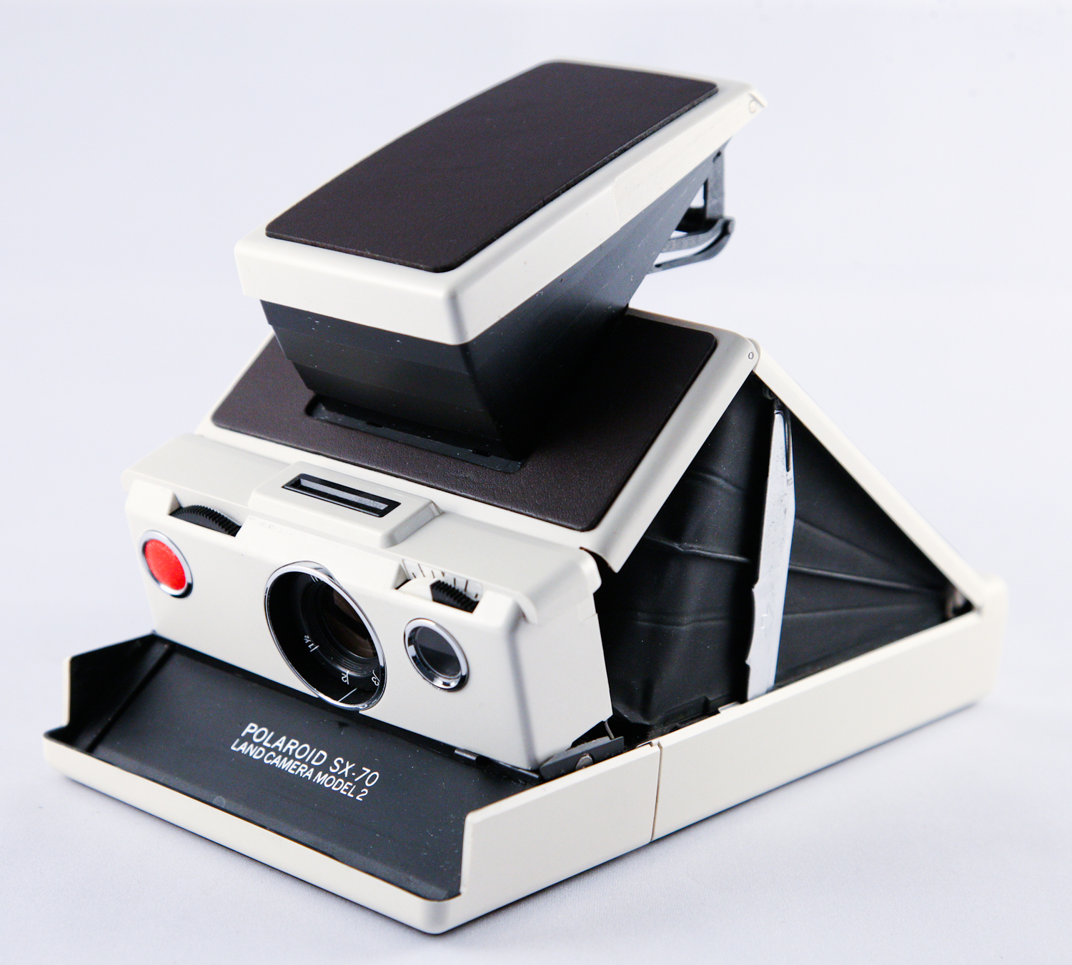 Sold